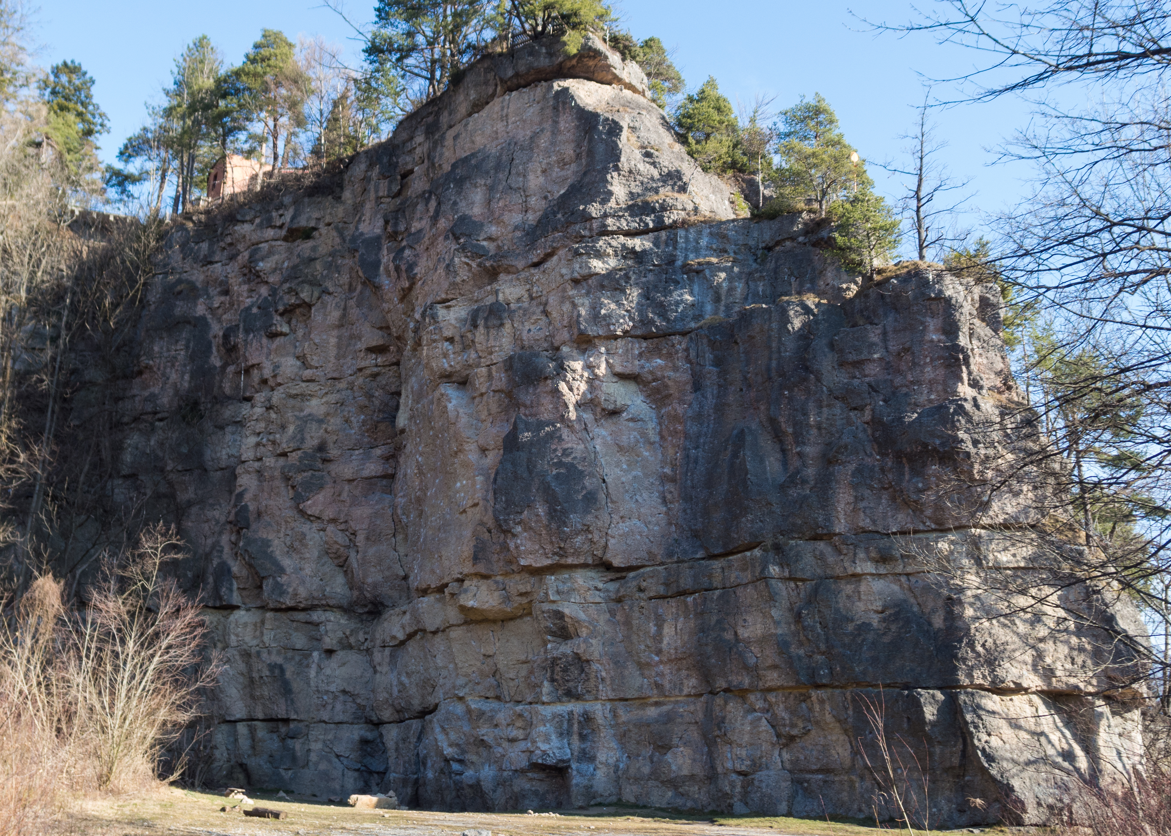 Der Höttinger Steinbruch unterhalb der Hungerburg in Innsbruck, der auch als Klettergarten dient. Das Gestein ist Höttinger Brekzie.